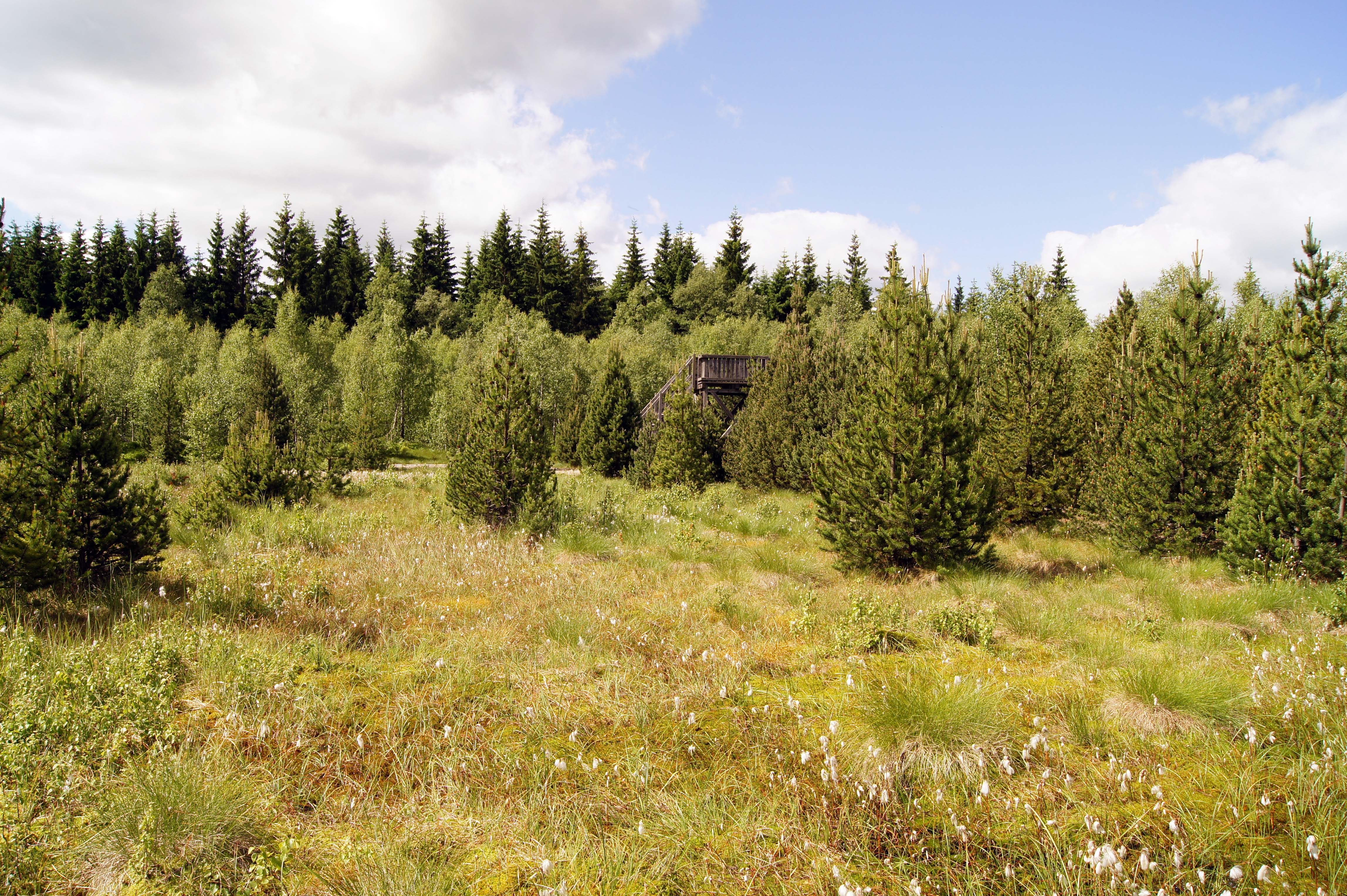 Die Stengelhaide im NSG Mothäuser Heide: Hochmoor in Marienberg-Kühnhaide